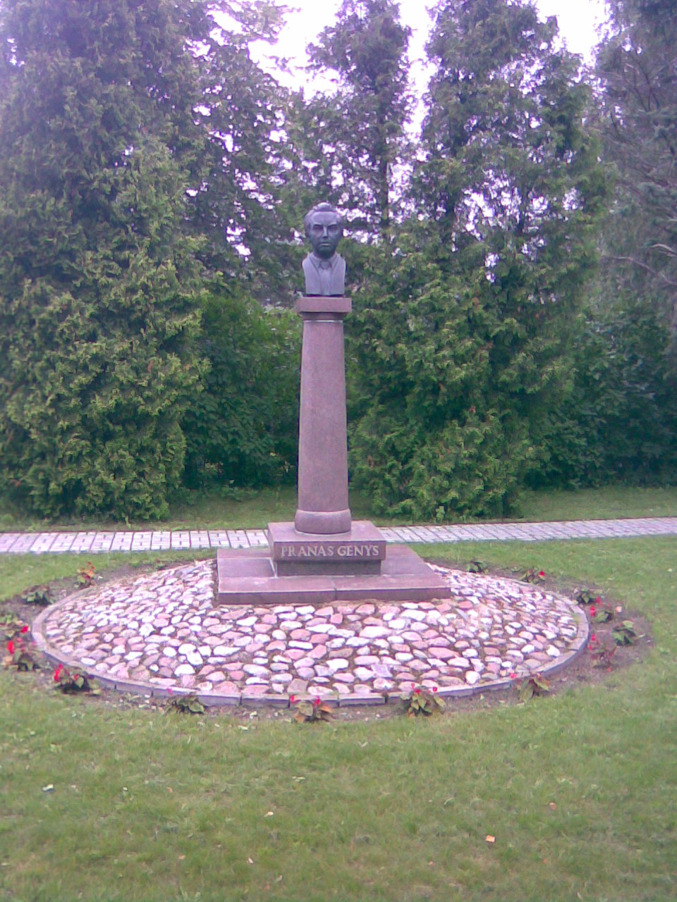 Žemaitėška: Prana Genė, Žemaitiu Alkas moziejė ikoriejė statola šalėp moziejaus